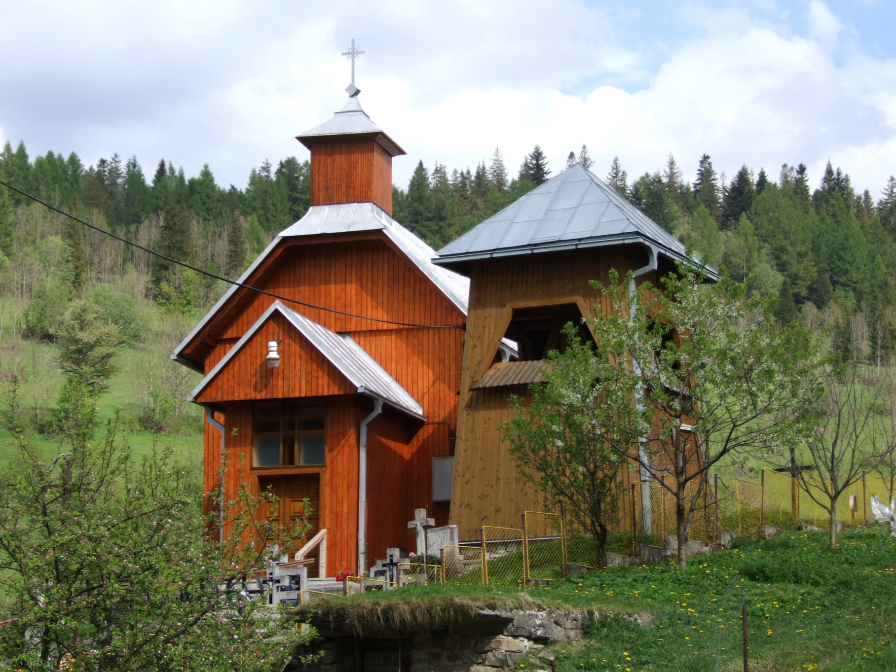 Malá Franková (Frankówka)